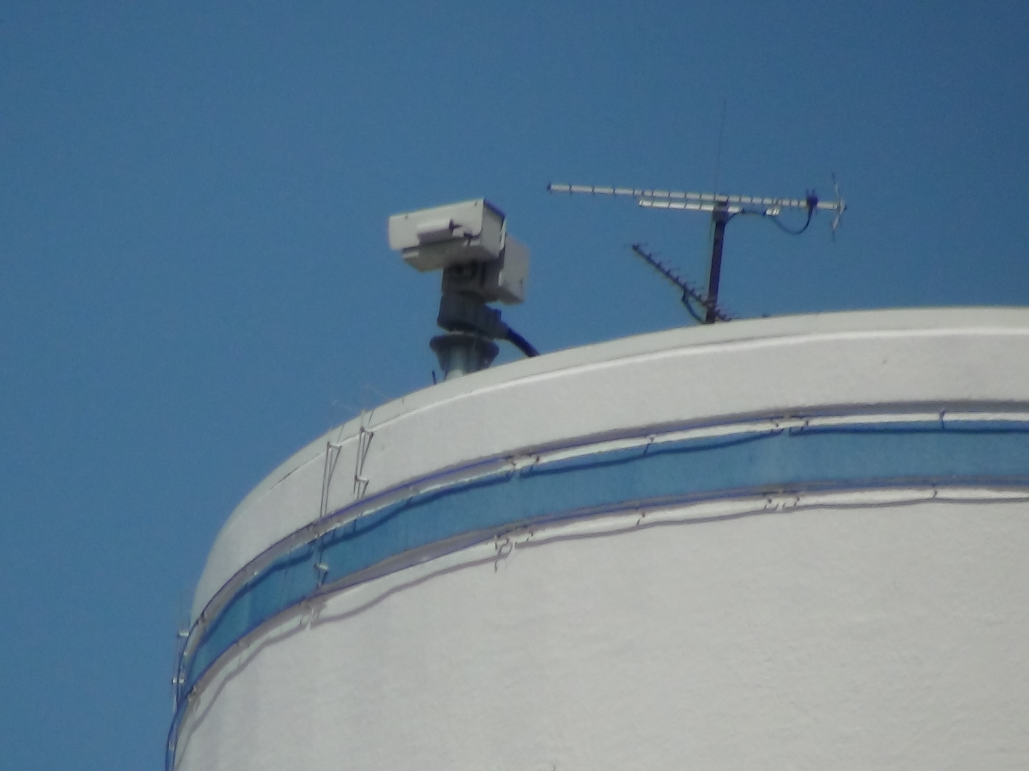 2012年頃撮影。